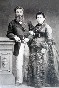 Алексей Фёдорович и Елена Григорьевна Морозовы — купцы 1-й гильдии, почётные граждане Бийска, благотворители